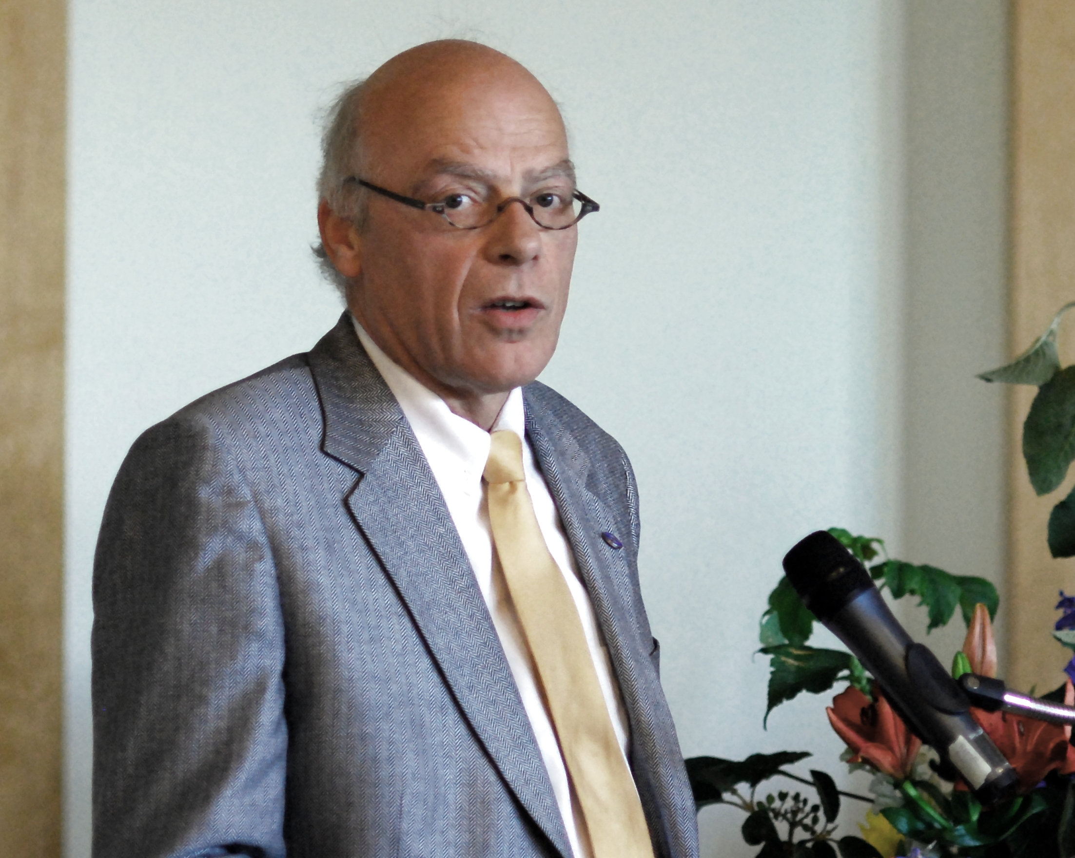 Gerhard Ulrich, Bischof des Sprengels Schleswig und Holstein der Nordelbischen Kirche, trägt während der Nordelbischen Synode vom 5.–6. Juni 2009 in Lübeck, Deutschland, den Abschlußbericht über die nordelbische Reform vor. (Foto: Pittkowski)